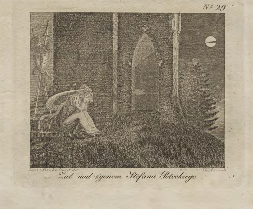 Laura Potocka (autorka wzoru), Żal nad zgonem Stefana Potockiego, przed 1814, miedzioryt, ryt. Jan Ligber, ilustracja do dzieła „Śpiewy historyczne” Juliana Ursyna Niemcewicza, Wojewódzka Biblioteka Publiczna w Opolu